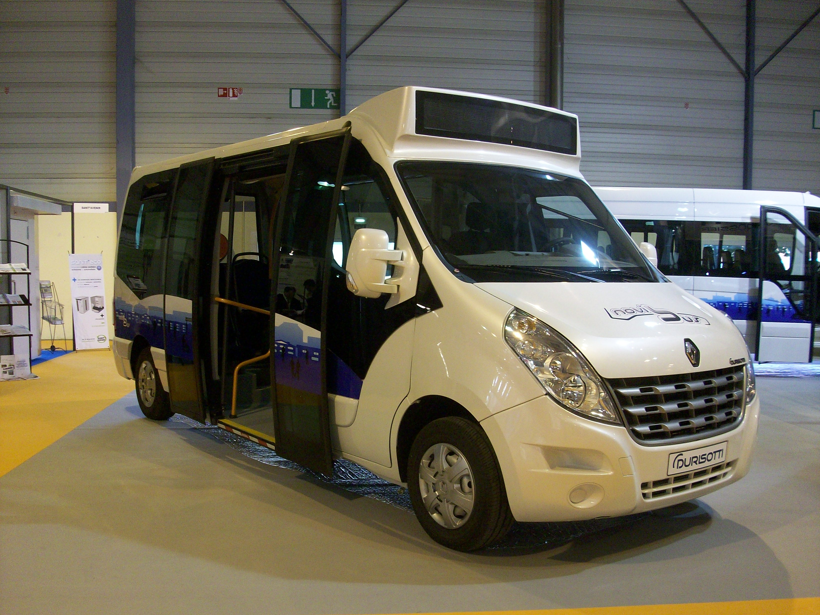 Midibus Durisotti exposé aux 23e RNTP, Strasbourg